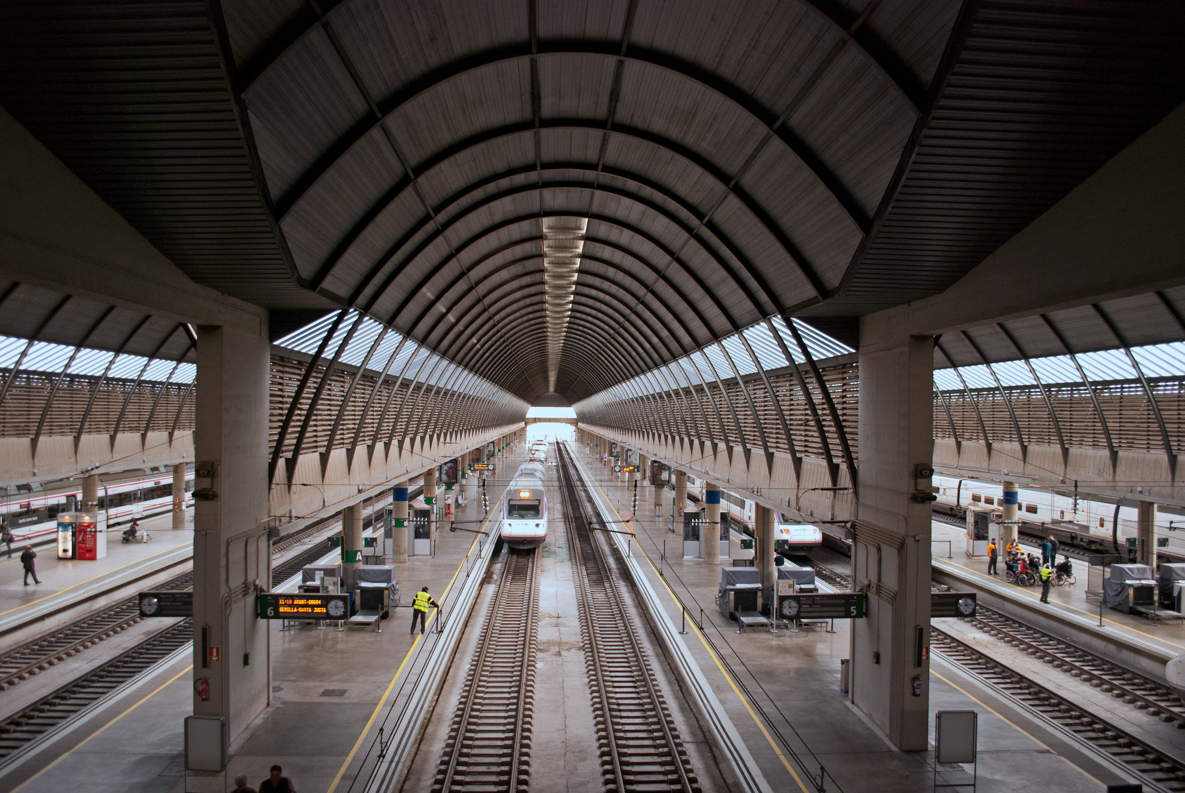 Estación de Santa Justa Sevilla